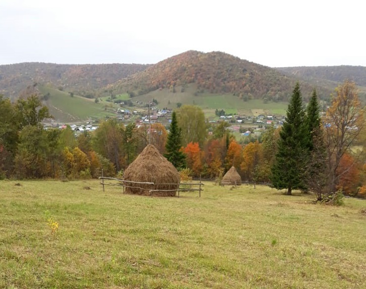 Стога. Белорецкий район. Башкортостан